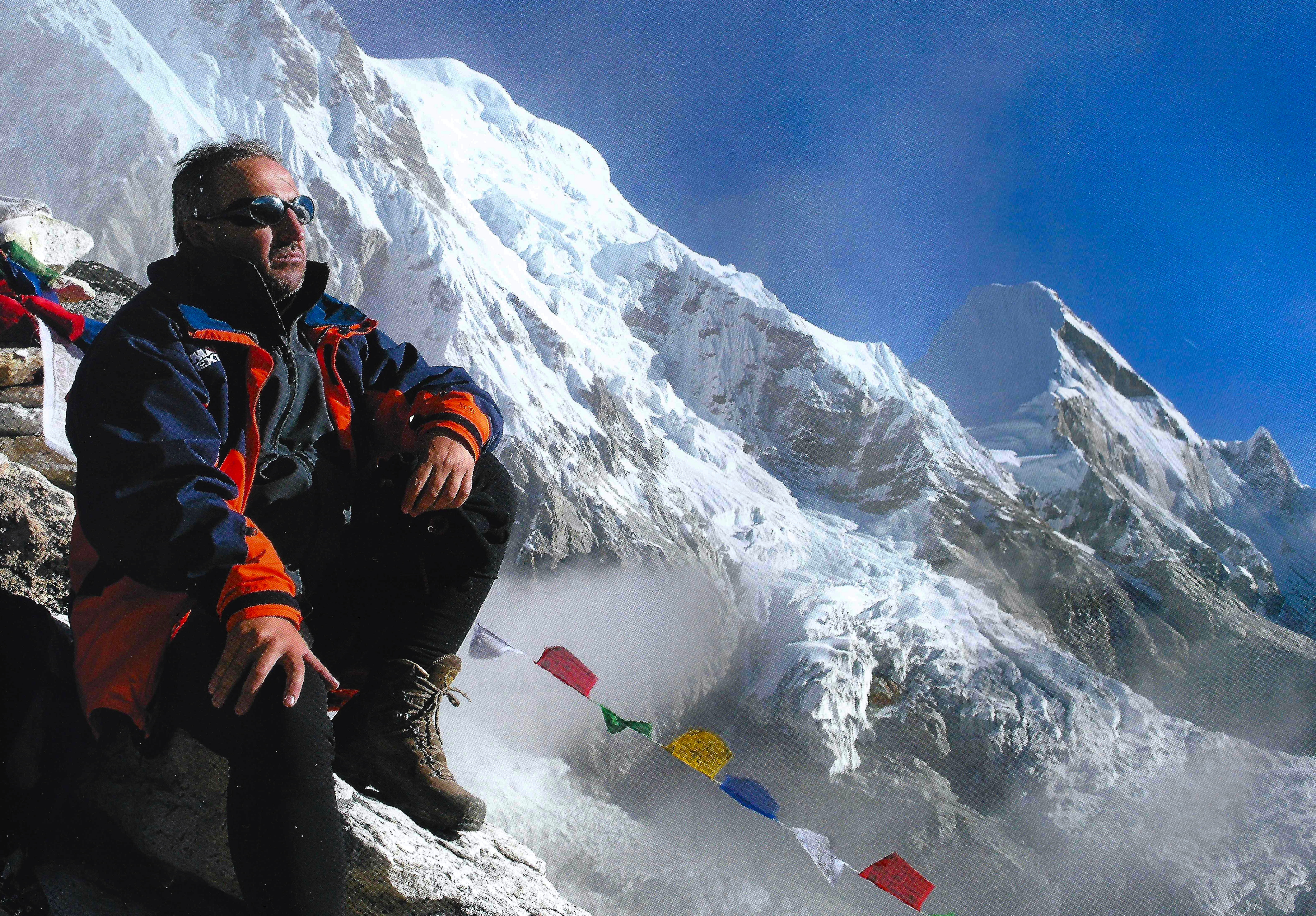 Пребывание в Непале, Владимир Цвиль, 2005